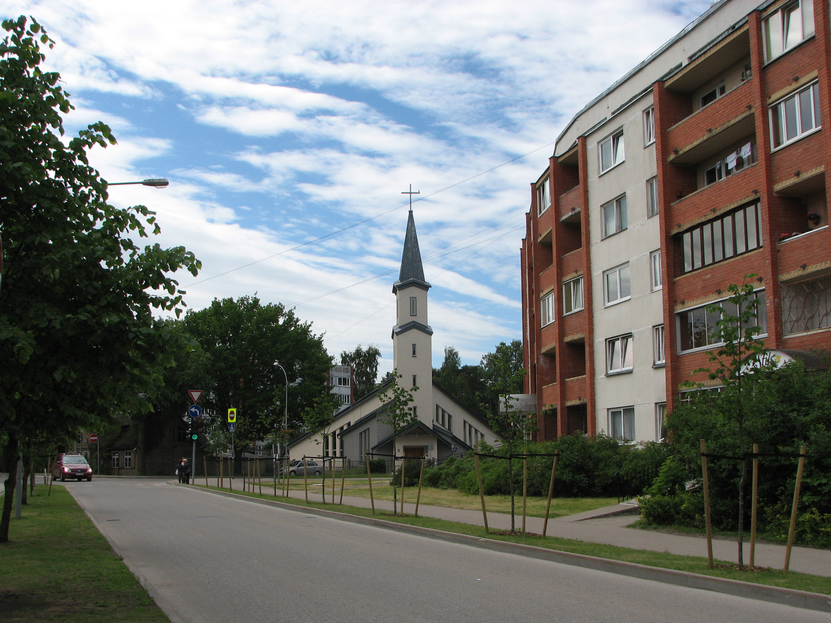 Catholic church in Kauguri, Jurmala, Latvia. Католическая церковь в Каугури, Юрмала, Латвия.